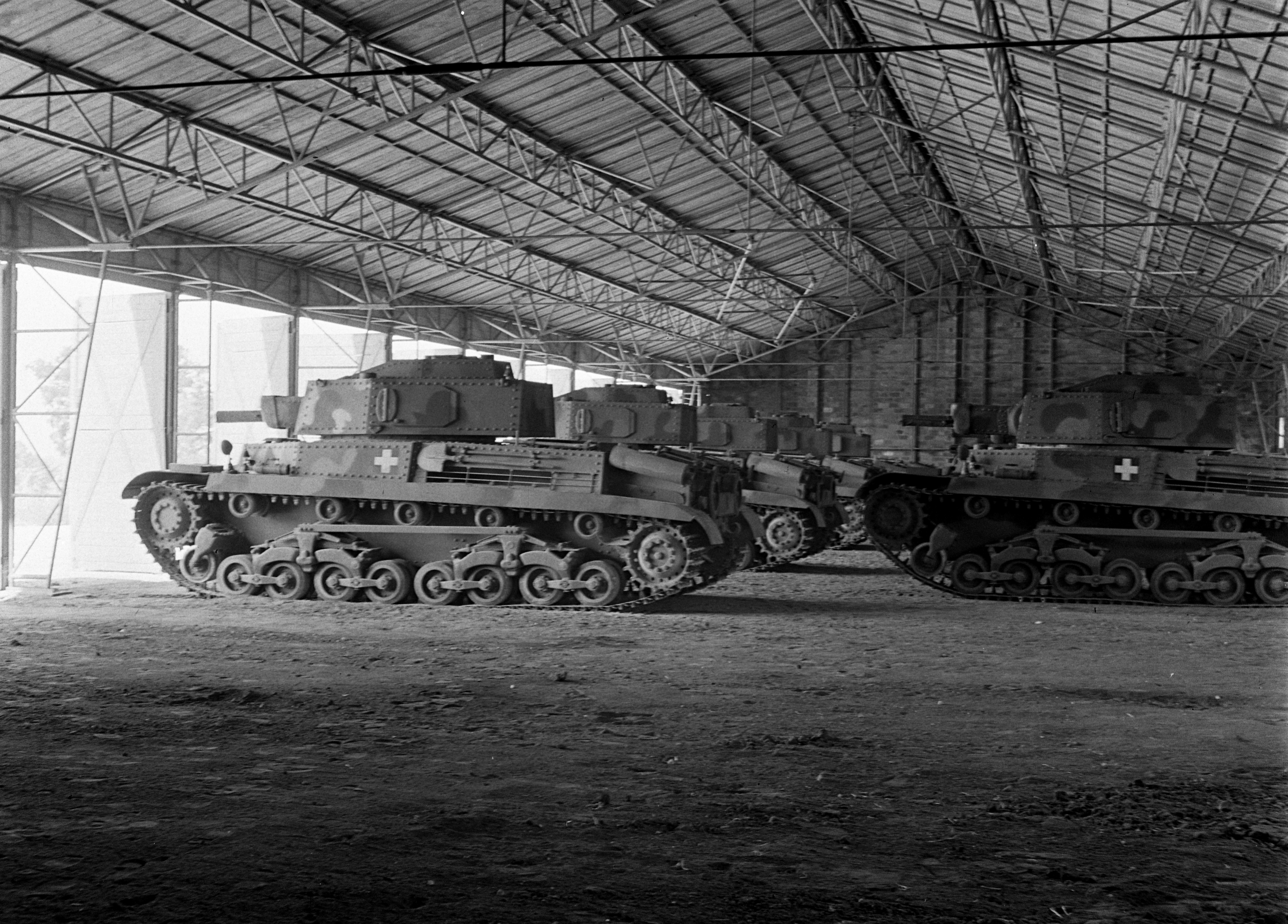 Mátyásföld, Újszász utca 41-43. Magyar Királyi Honvéd gépkocsiszertár, Turán típusú harckocsik. Location: Hungary, Budapest XVI. Tags: Hungarian brand, tank, insignia, camouflage pattern, military, Budapest Title: Mátyásföld, Újszász utca 41-43. Magyar Királyi Honvéd gépkocsiszertár, Turán típusú harckocsik.